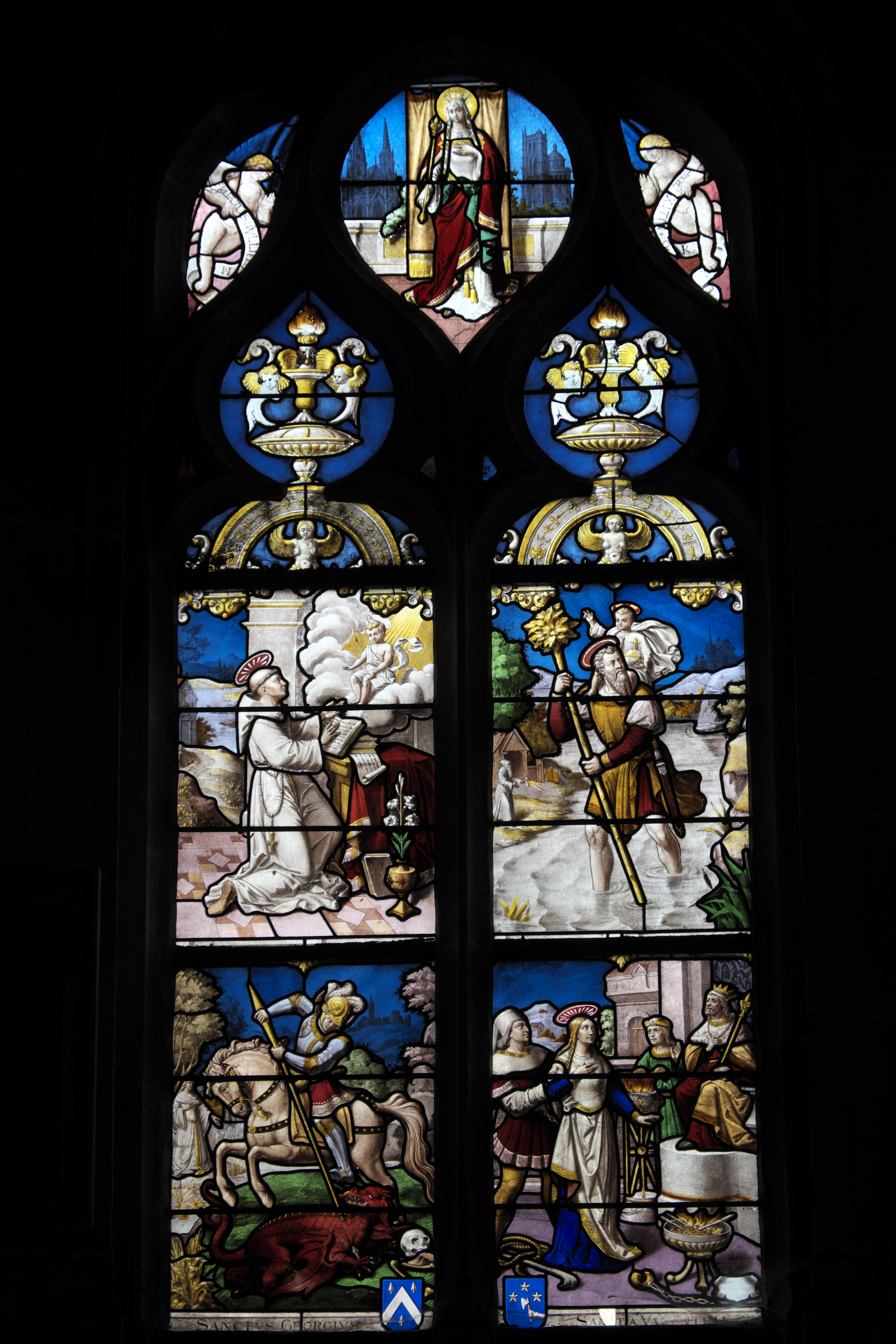 Katholische Kirche Saint-Pierre in Dreux im Département Eure-et-Loir (Centre-Val de Loire/Frankreich), Bleiglasfenster in der Clothildenkapelle mit den Wappen der Stifter; Darstellung: Hl. Georg (unten links), hl. Valentina (unten rechts), Antonius von Padua (oben links), hl. Christophorus (oben rechts), im Maßwerk: Hl. Clothilde